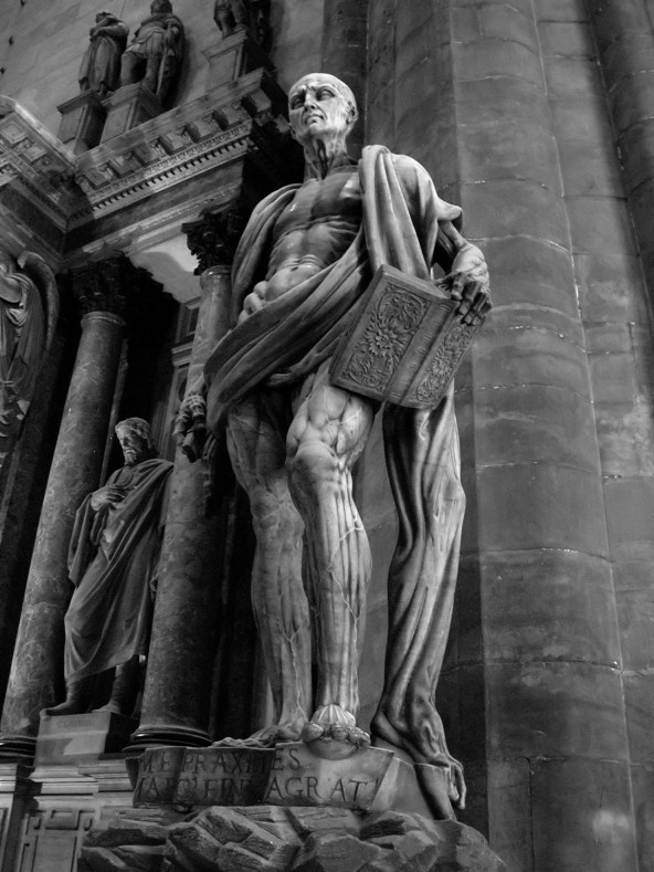 San Bartolomeo Scorticato, statua di Marco d'Agrate conservata nel Duomo di Milano. Foto da me realizzata.